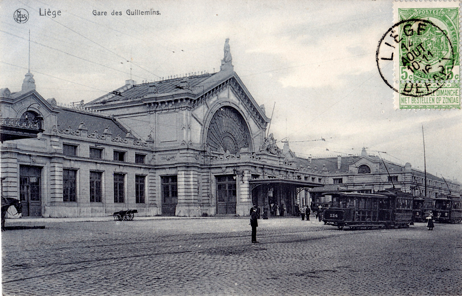 Car te postale ancienne éditée par NELS :LIEGE - Gare des Guillemins